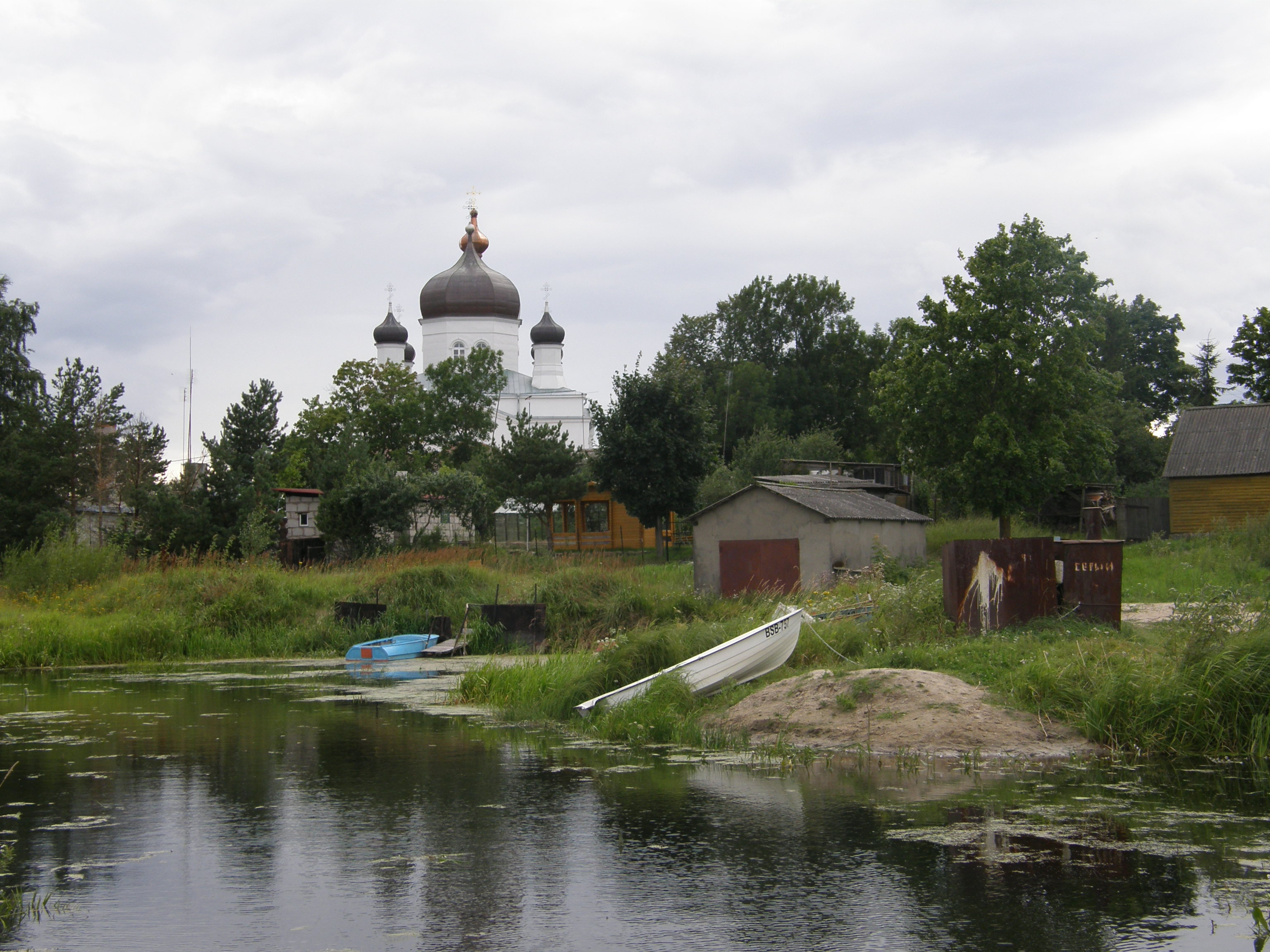 Vaade Vasknarva kirikule Narva jõe poolt.